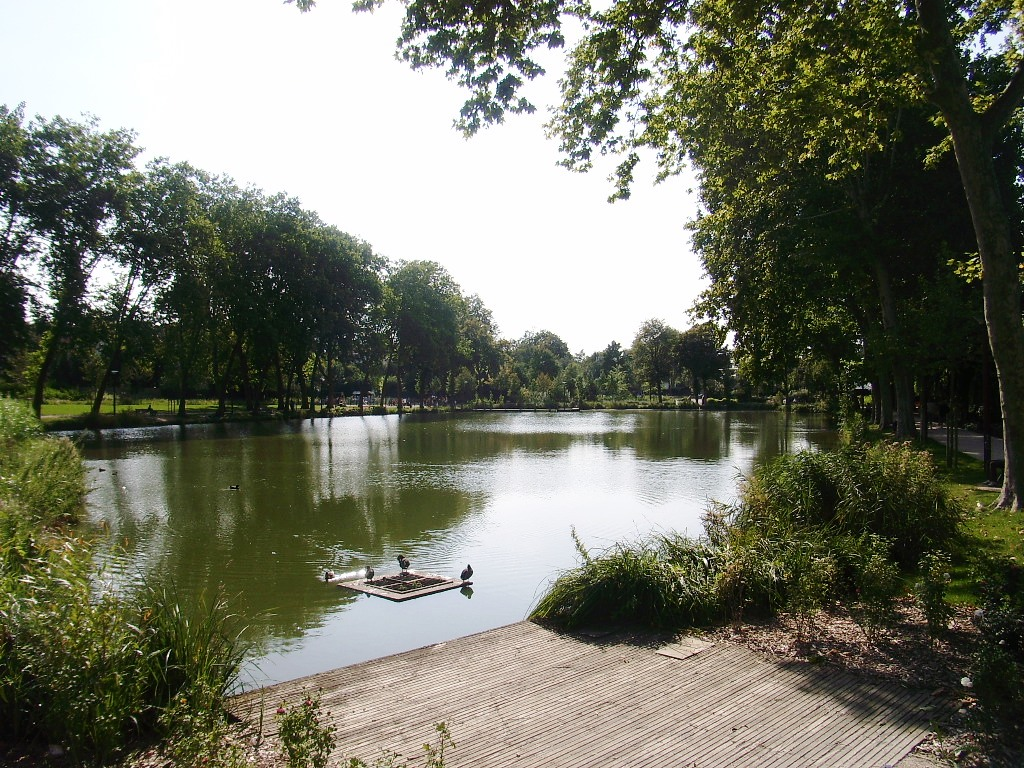 Lac du Mail, Orsay